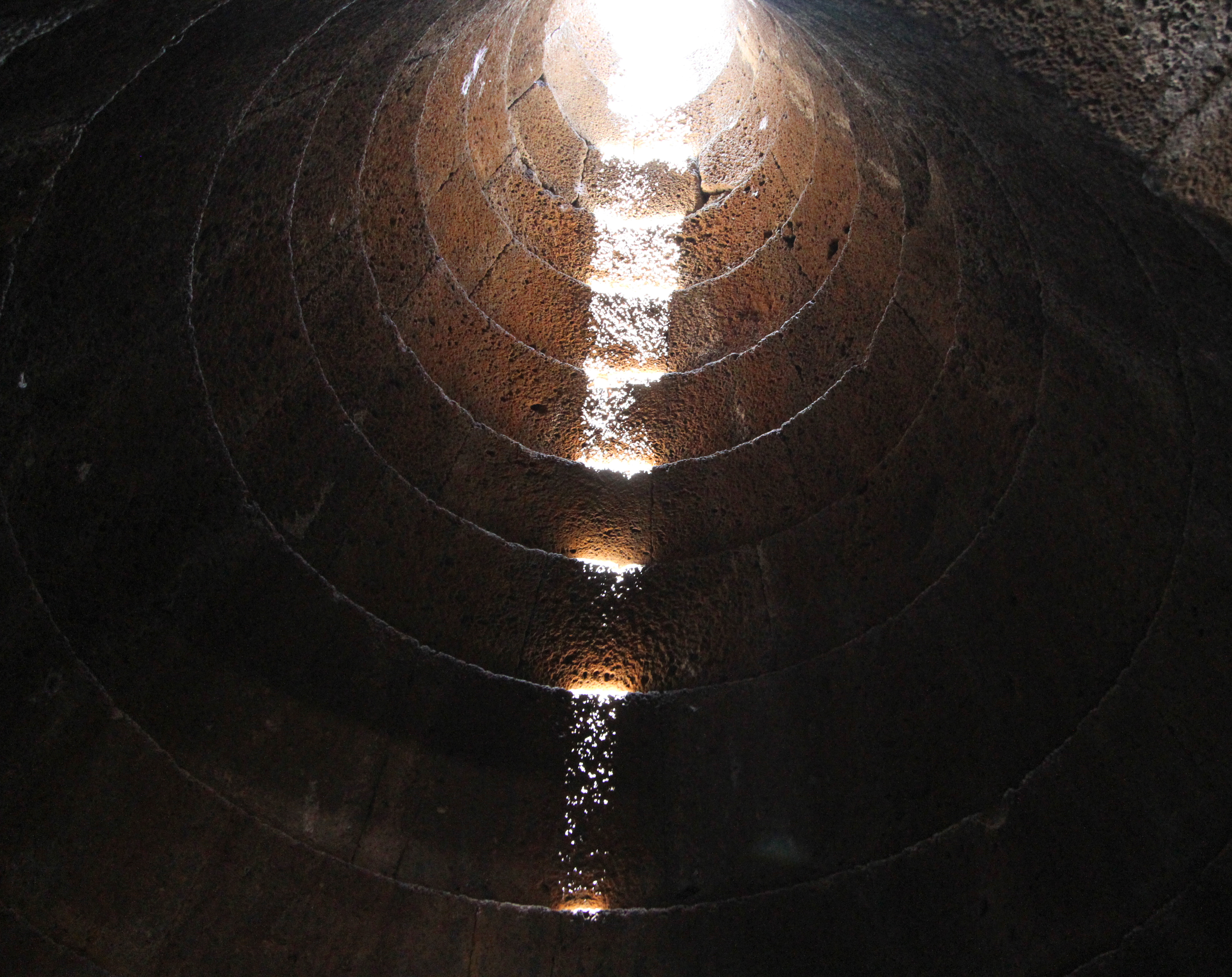 Pozzo sacro di Santa Cristina: la volta a tholos sopra il pozzo.